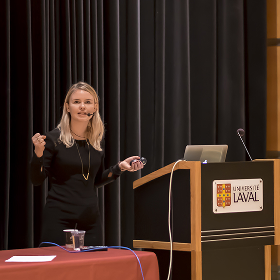 Léa Clermont-Dion auteure, lors d'une conférence le 16 mars 2016 à l’université Laval, Québec